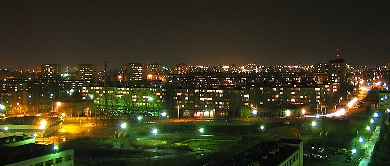 Koszalin widziany nocą. Zdjęcie wykonane z bloku w północnej części miasta.